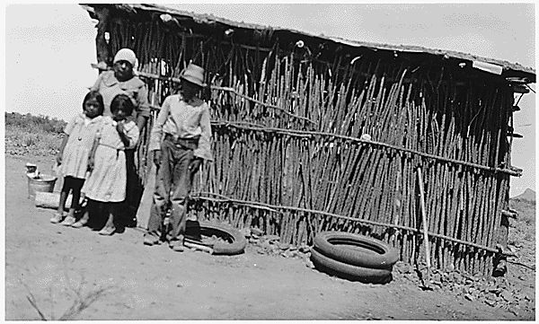 Familie der Papago vor ihrem Haus aus Zweigen; Sells Indian Reservation, Sells, Arizona